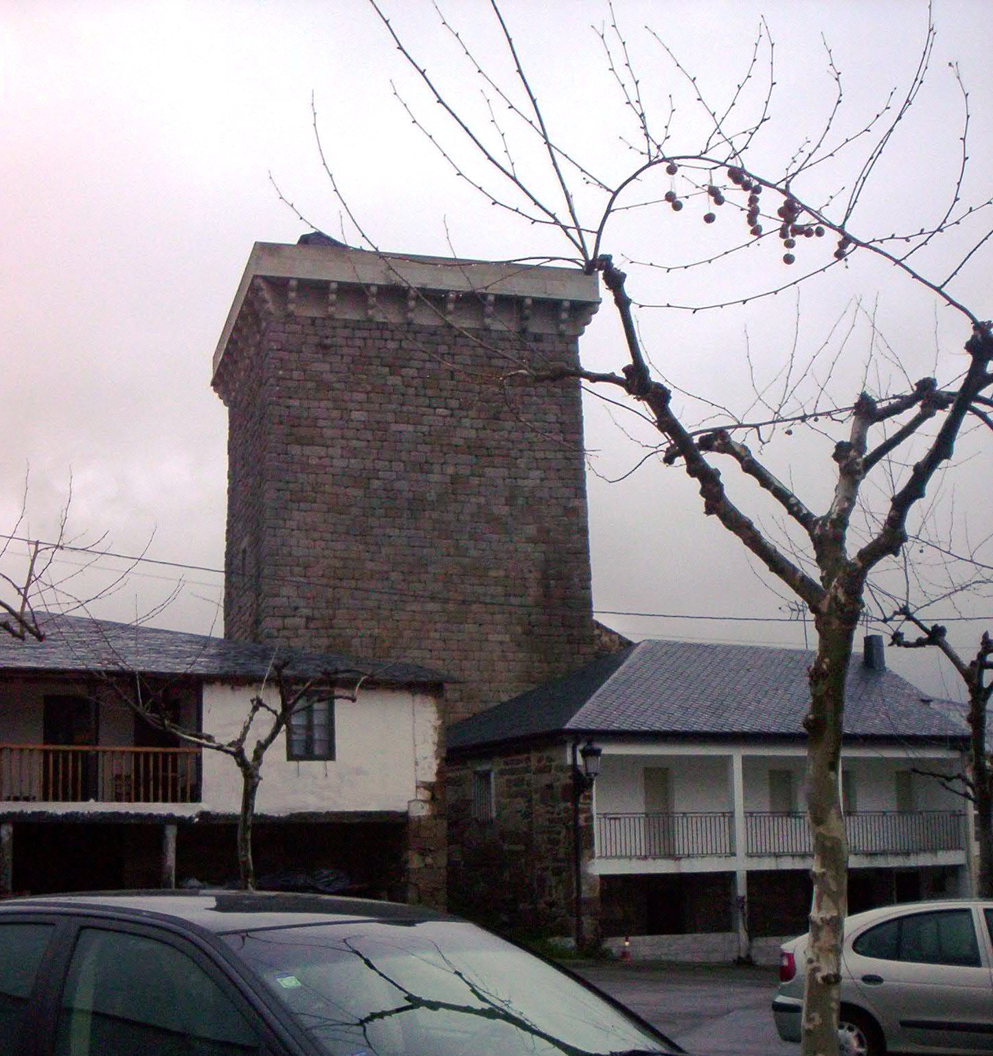 O bolo, Ourense, Galiza, Spain.